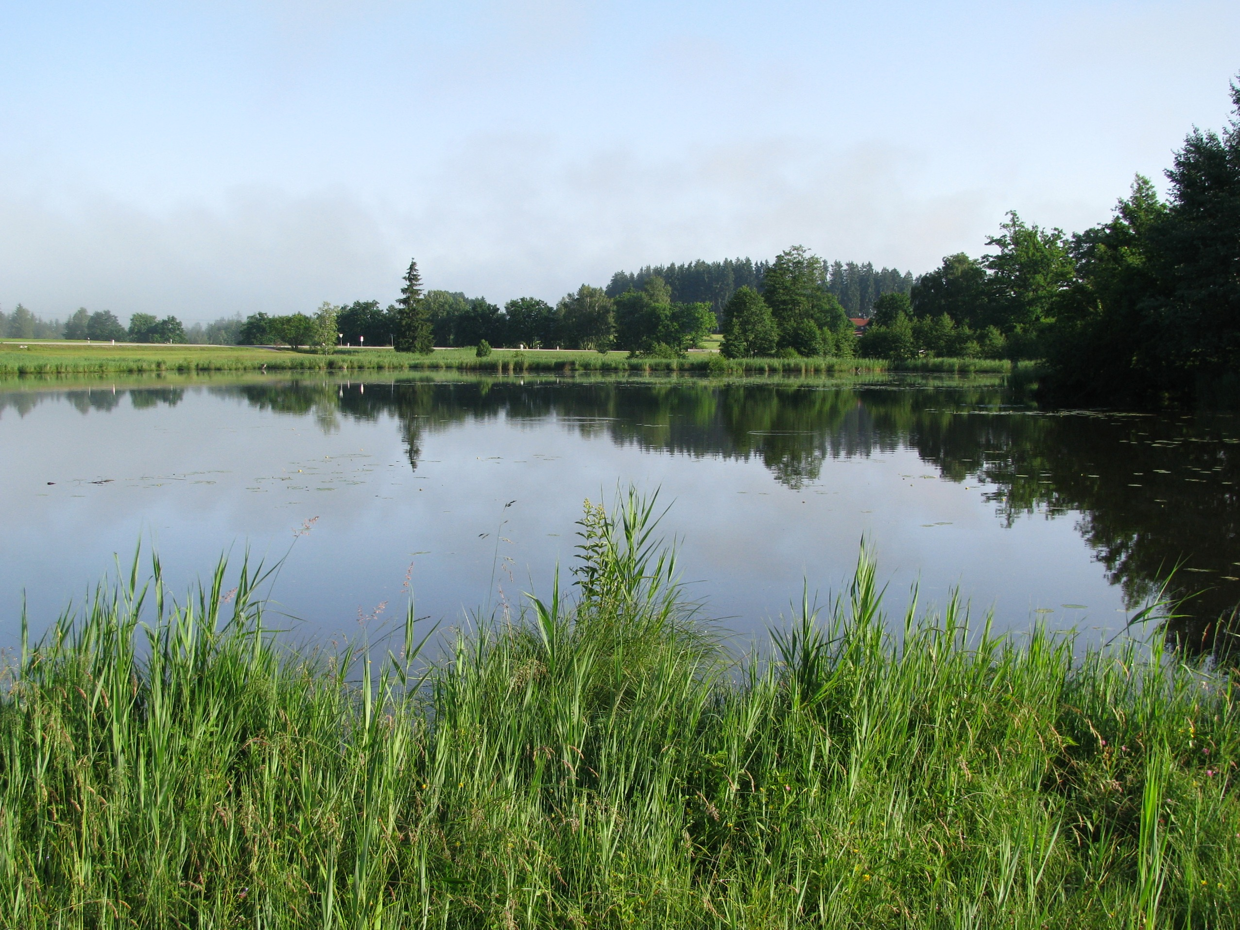 Riederner Weiher von Südosten